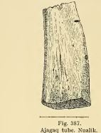 Fragment d'un ajagaq (sorte de bilboquet), croqué par Georg Carl Amdrup, après une expédition menée en 1905.